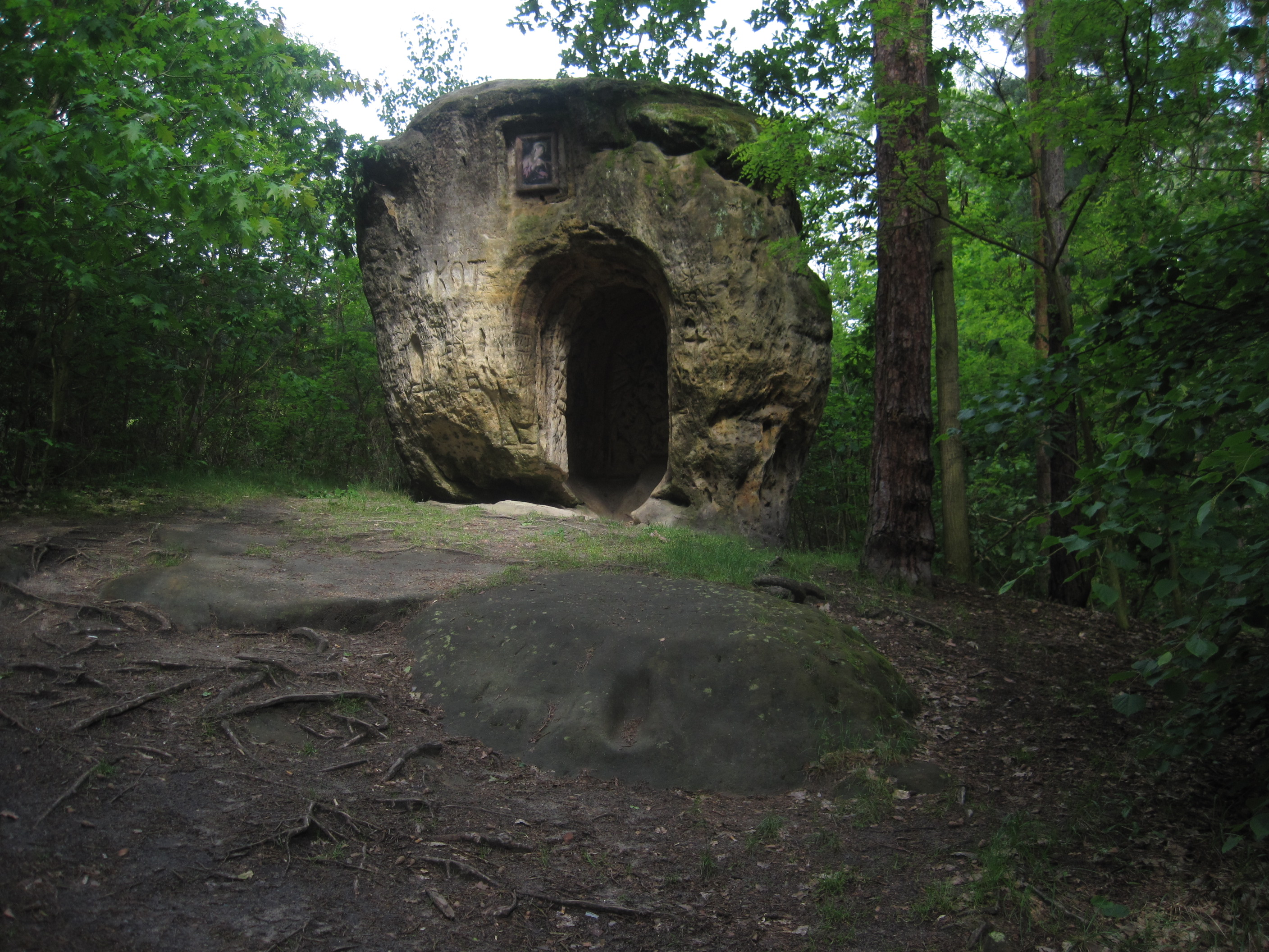 Kaple svaté Máří Magdaleny, pp. 286, Ješovice.